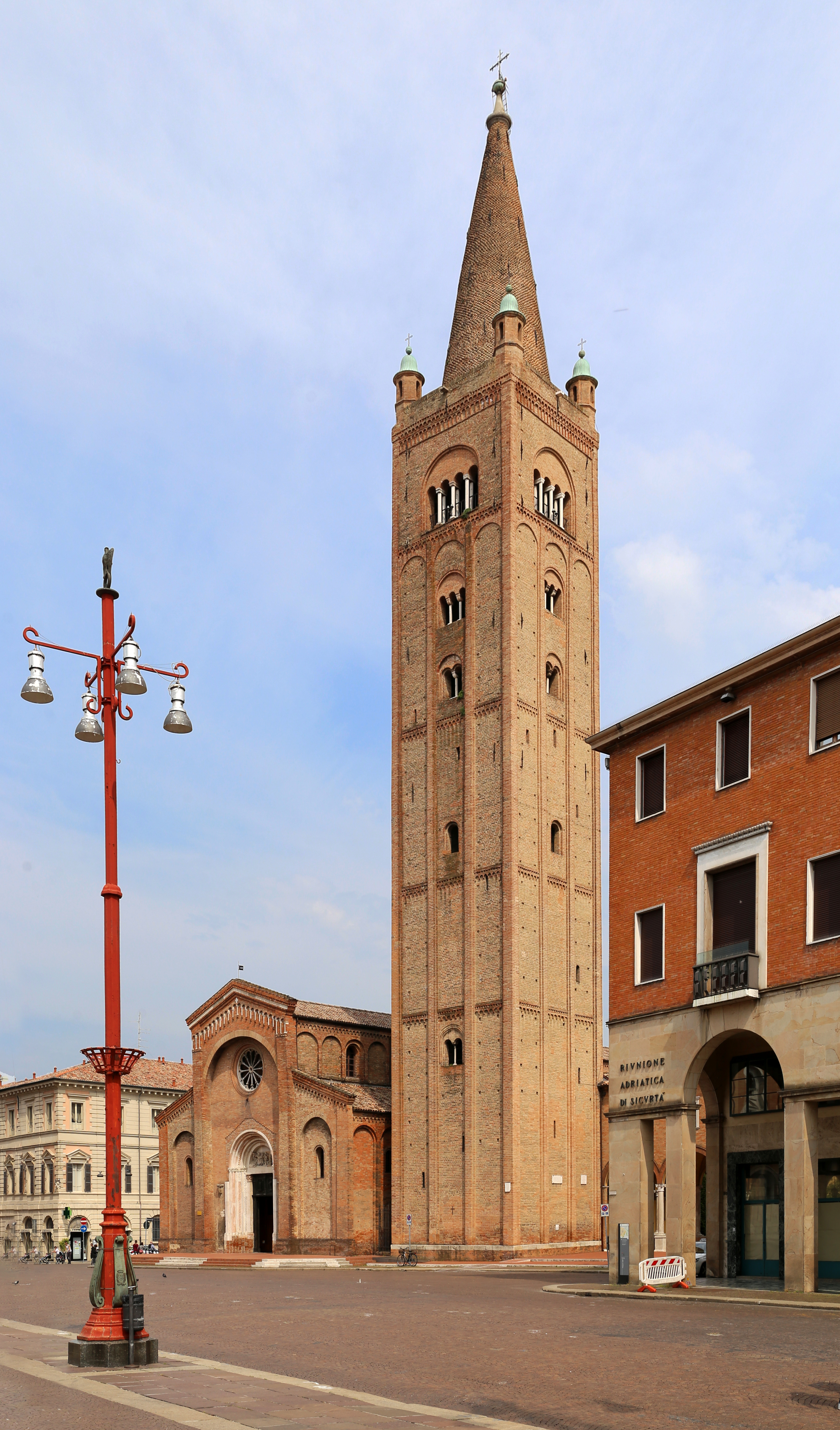 abbazia di San Mercuriale This is a photo of a monument which is part of cultural heritage of Italy.